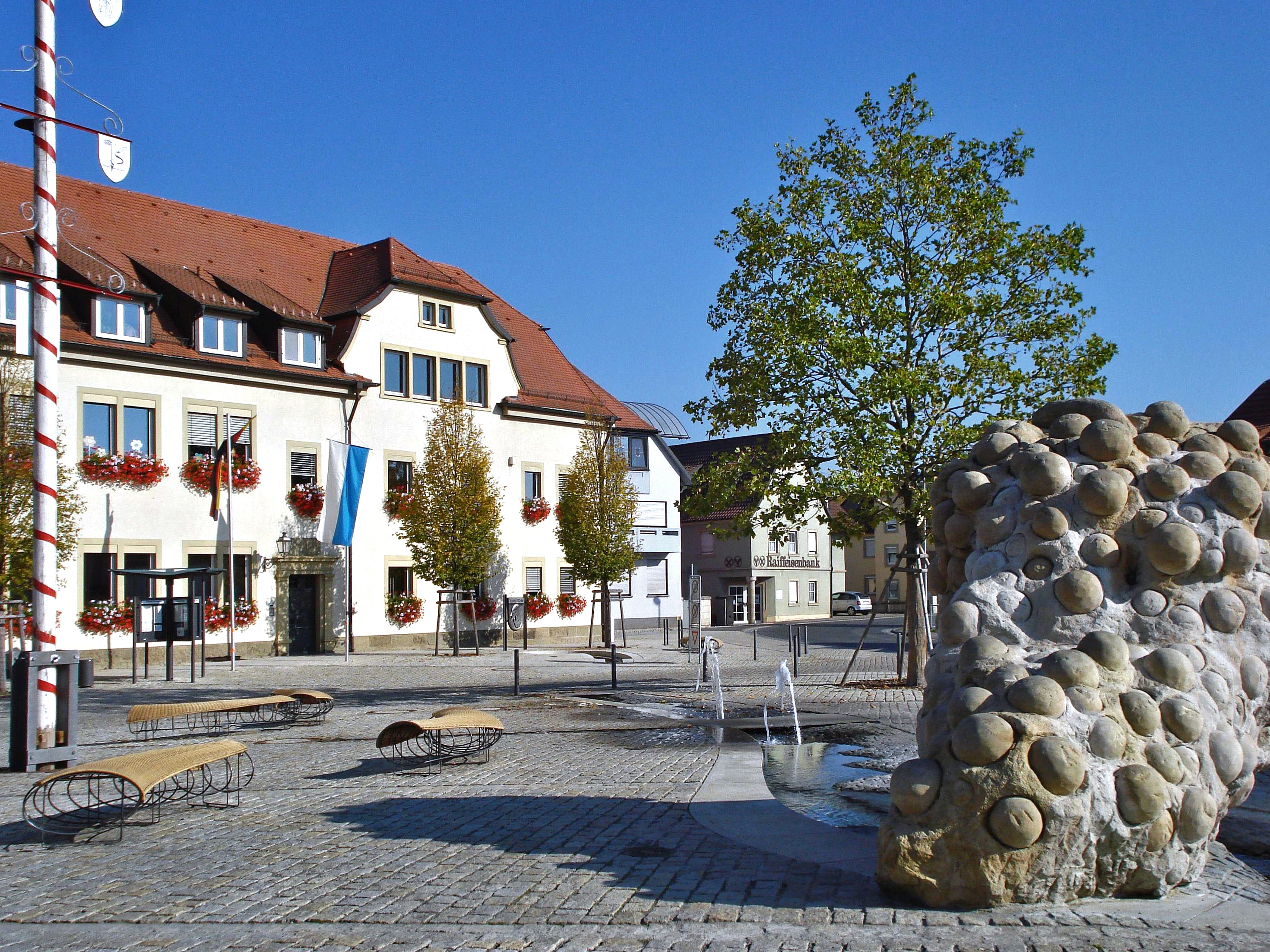 Marktplatz in Sand a. Main, Deutschland